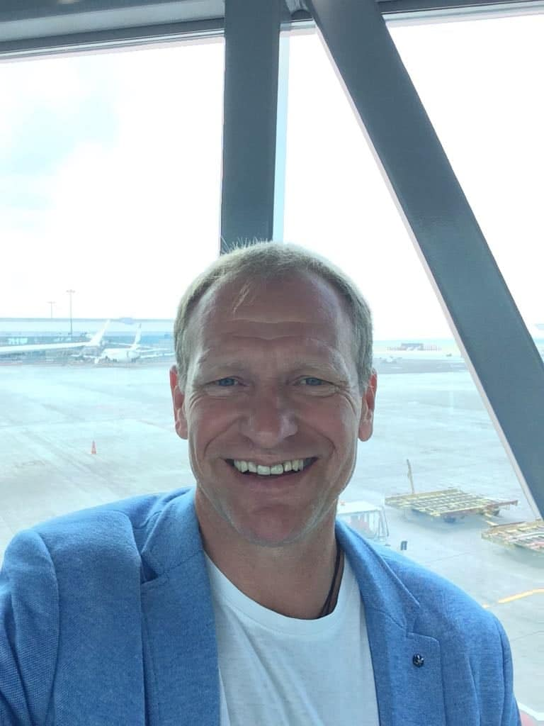 Josef Zajíc - hráč ledního hokeje